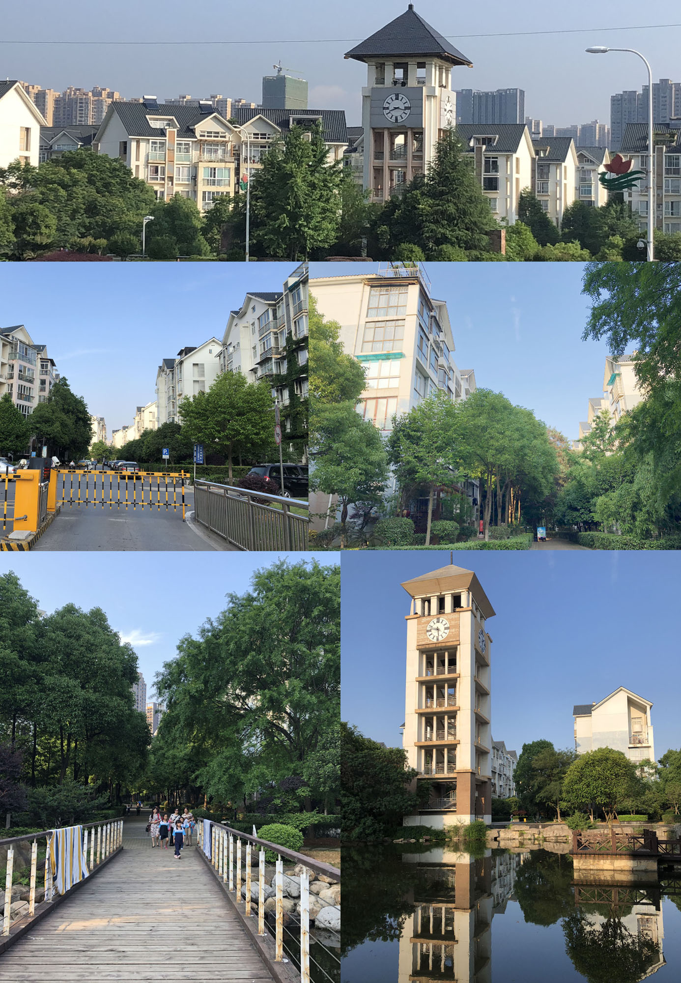 长沙八方小区外景